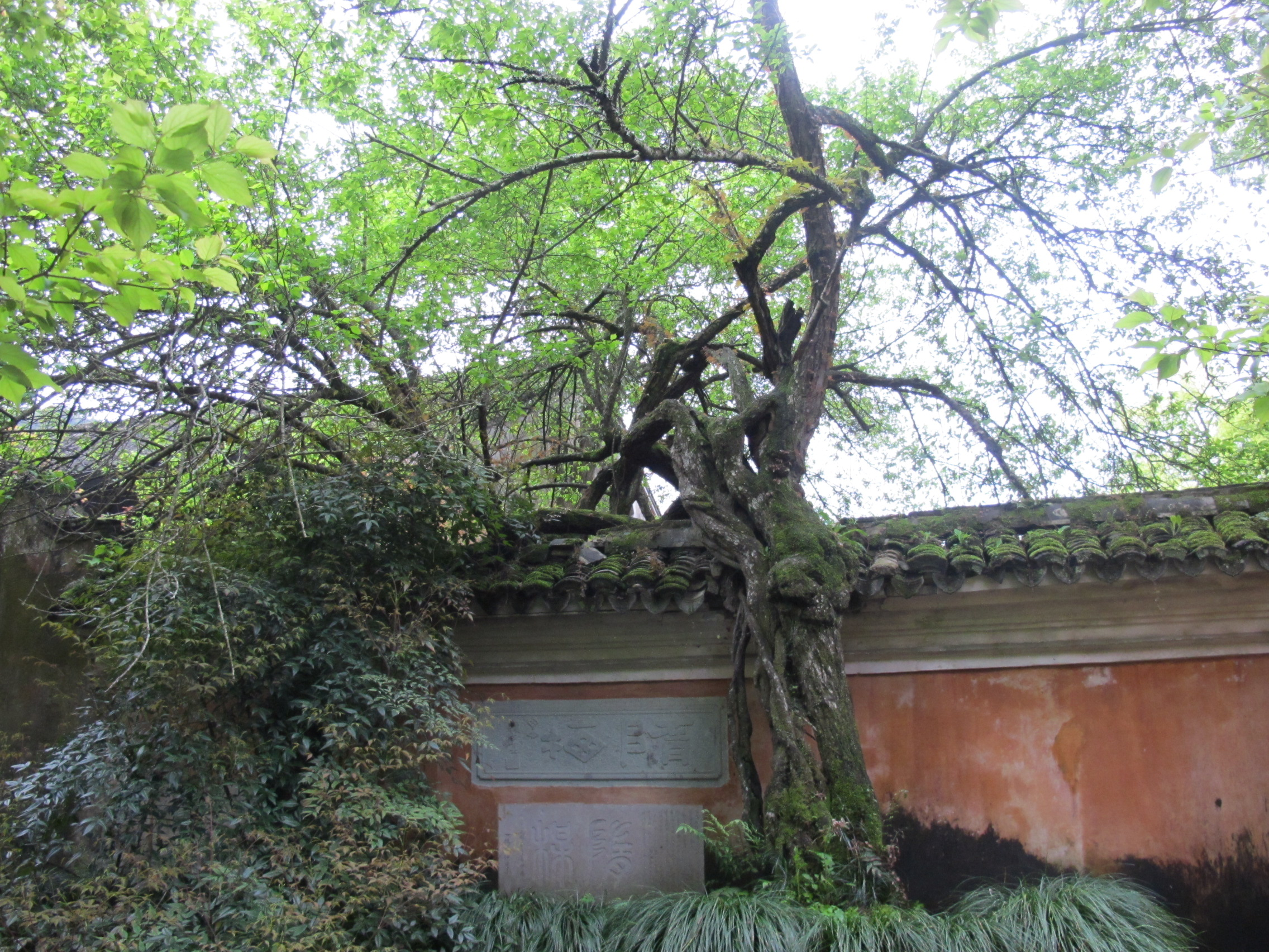 国清寺隋代梅树